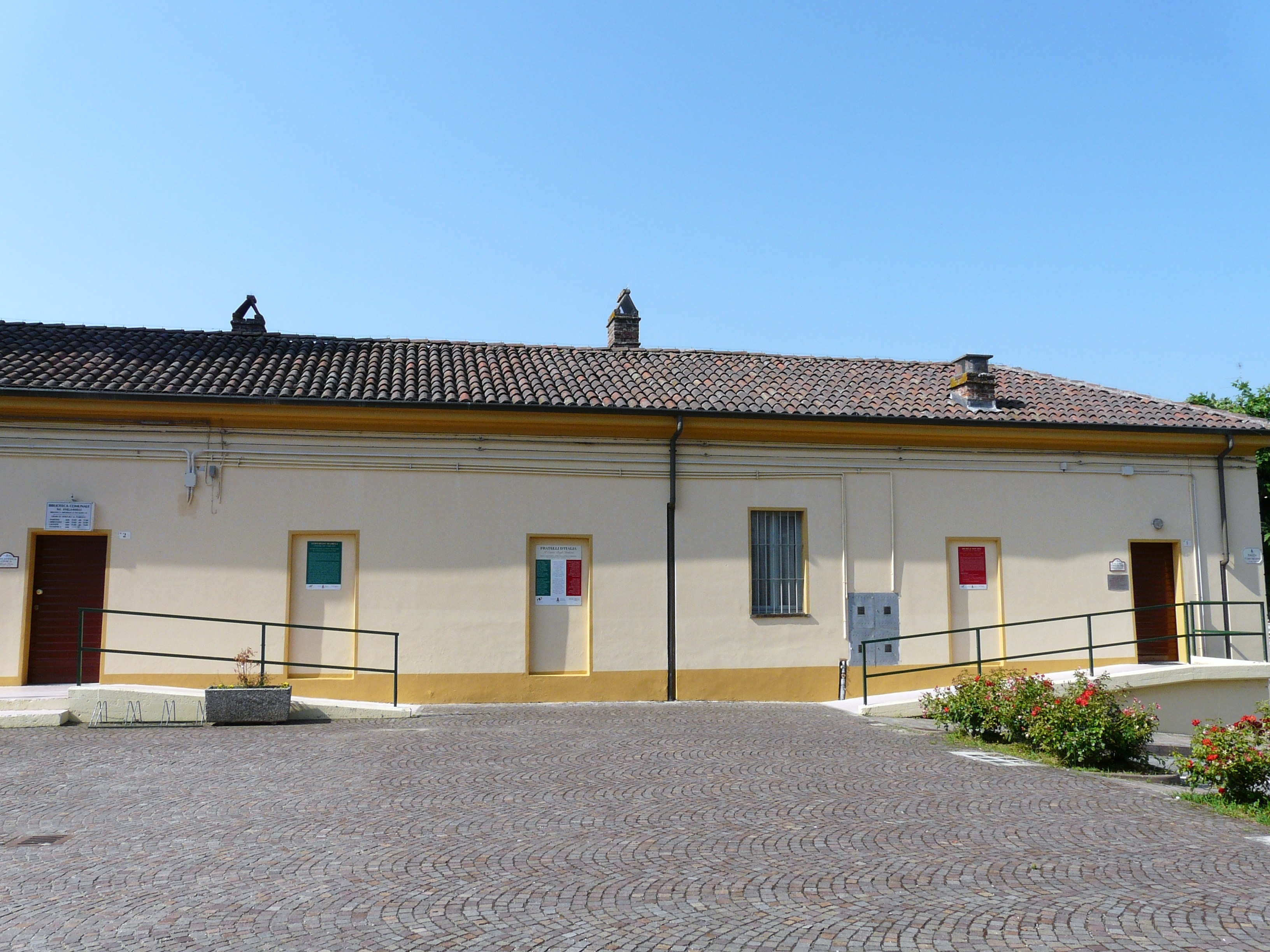 Biblioteca comunale, Mirabello Monferrato, Piemonte, Italia